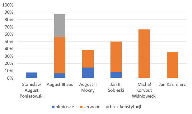 Liczba niedoszłych sejmów w stosunku do wszystkich zwołanych za panowania danego króla od Jana Kazimierza Wazy